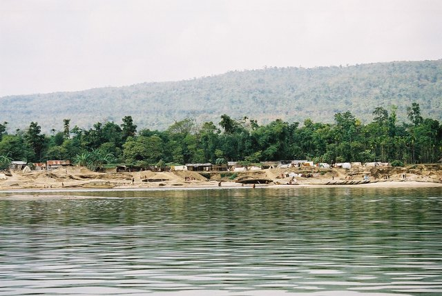 Jaflong, Sylhet, Bangladesh.